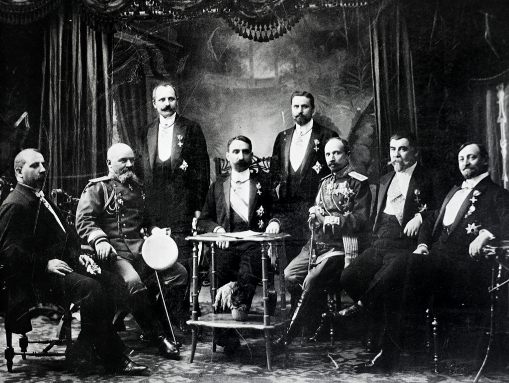 Кабинетът на Александър Малинов. От ляво надясно: Андрей Ляпчев, генерал Данаил Николаев, Никола Мушанов, Александър Малинов, Тодор Кръстев, Стефан Паприков, Иван Салабашев и Михаил Такев. 1908 г.